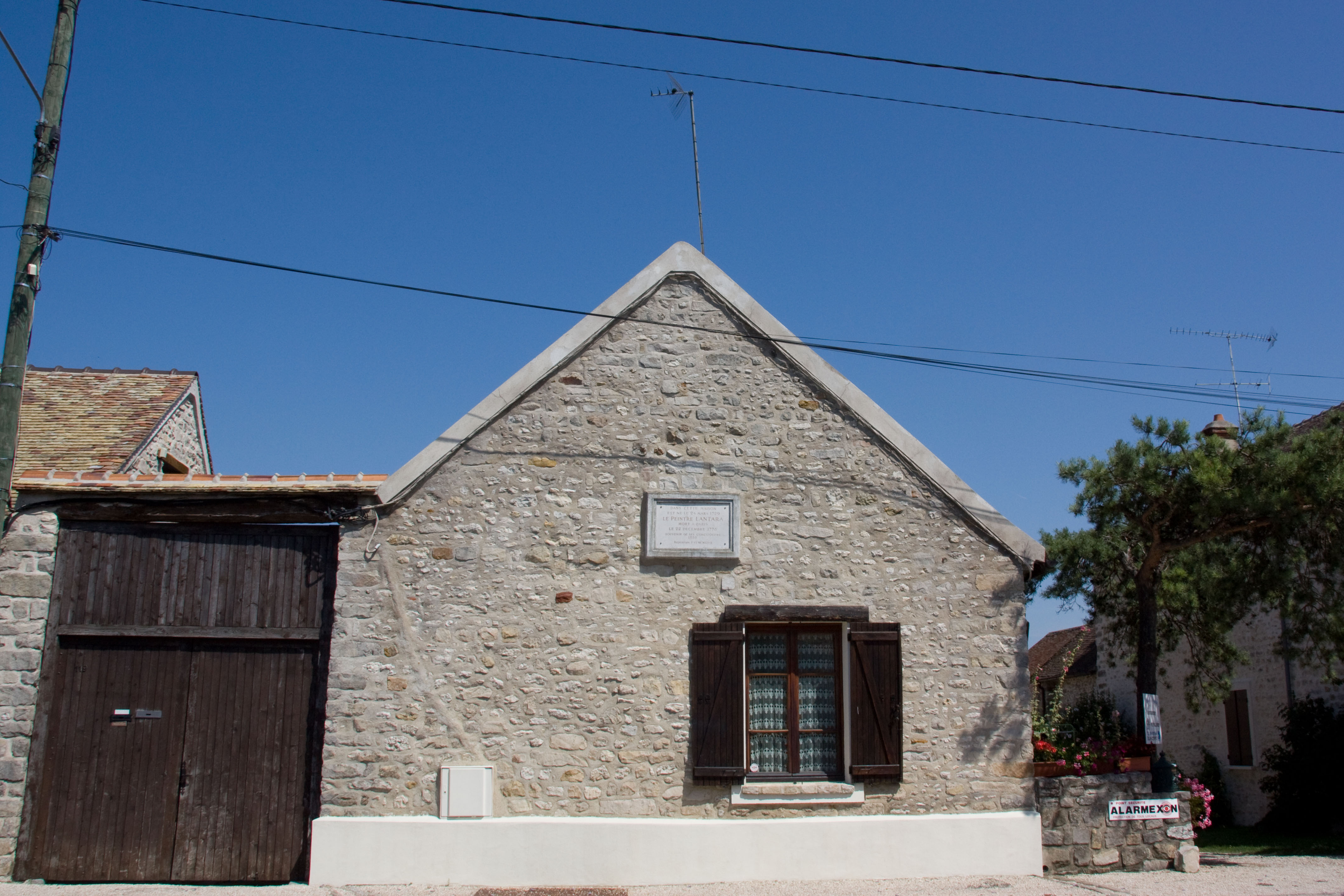 Maison où naquit le peintre Simon Mathurin Lantara, Oncy-sur-École, Essonne, France